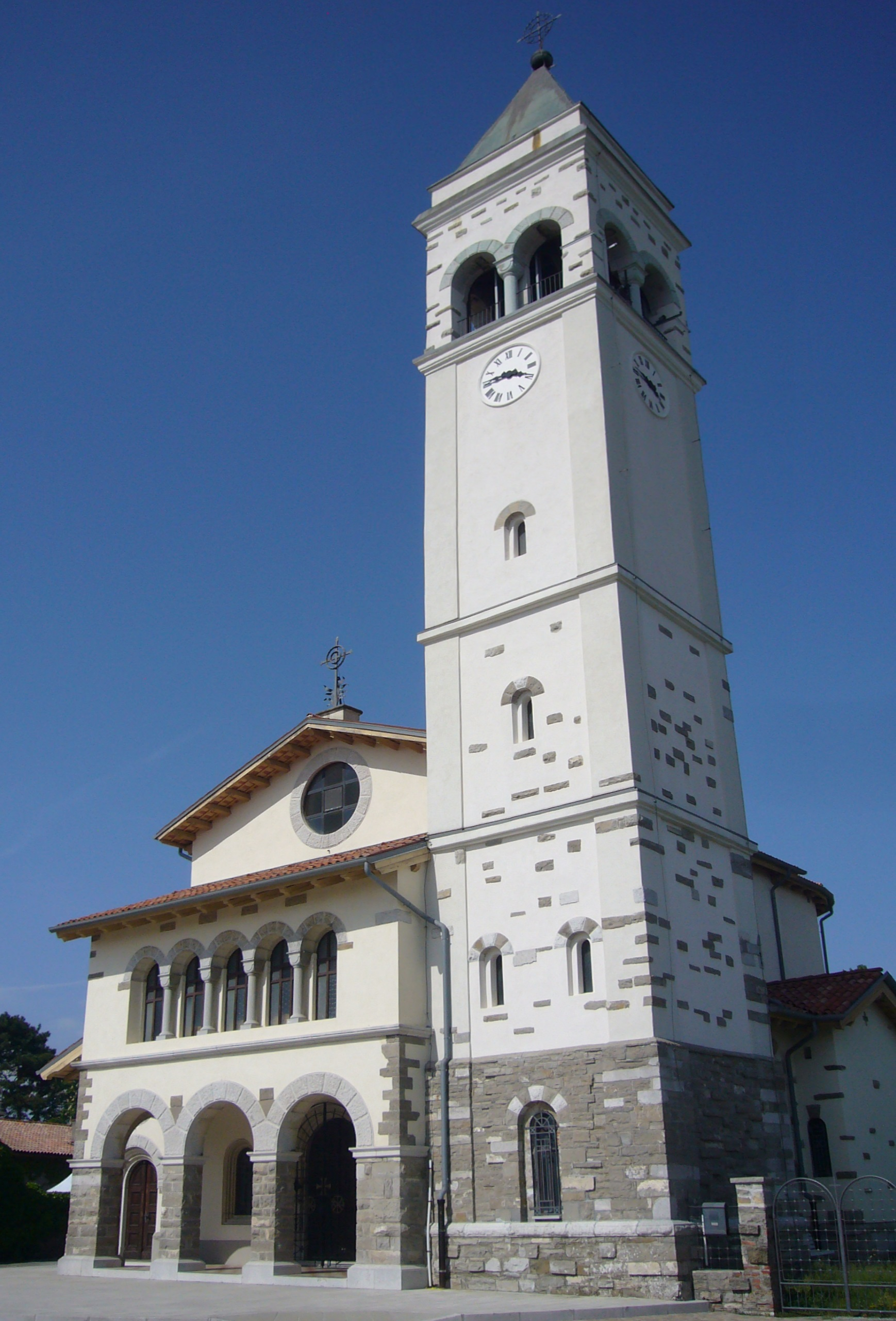 La chiesa parrocchiale di San Floriano del Collio (GO)